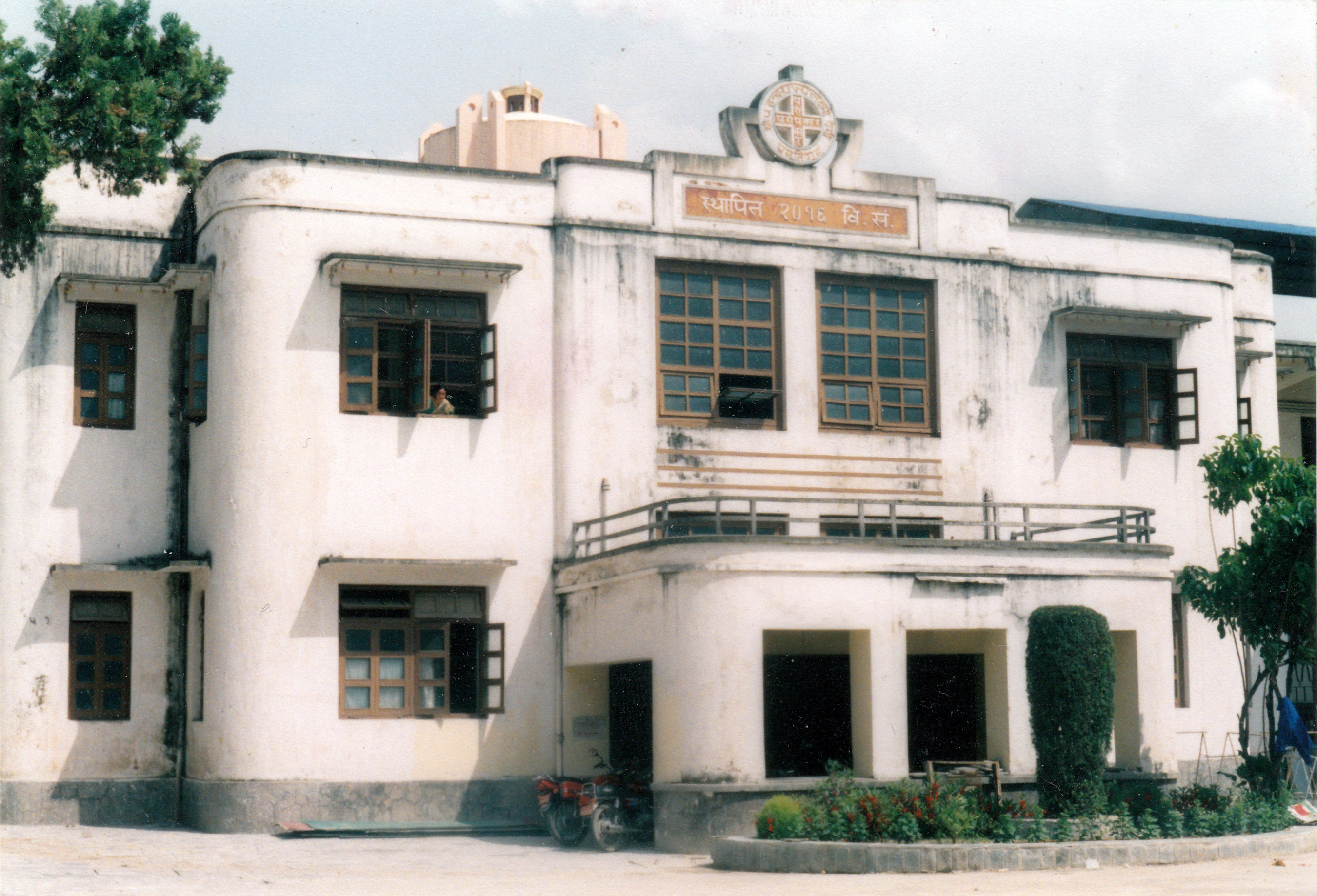 Paropakar Indra Rajya Lakshmi Devi Prasuti Griha maternity hospital established in 1959 in Kathmandu.